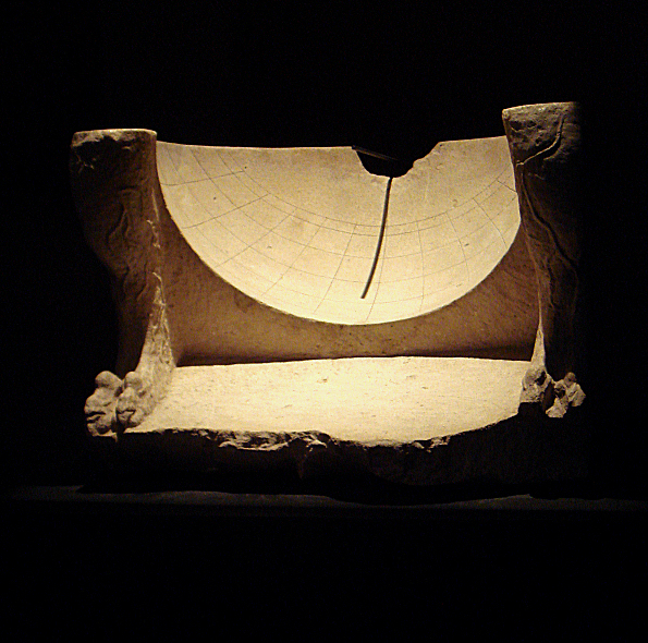 Sun dial from Ai Khanoum. Musée Guimet. Personal photograph 2007.